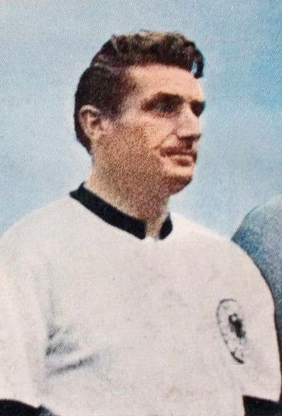 Fritz Walter en 1954 - CALCIATORI PANINI 1965-66.